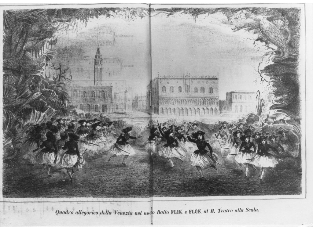 Tableau allégorique de la lagune vénitienne dans le ballet Flik et Flok au théâtre de la Scala